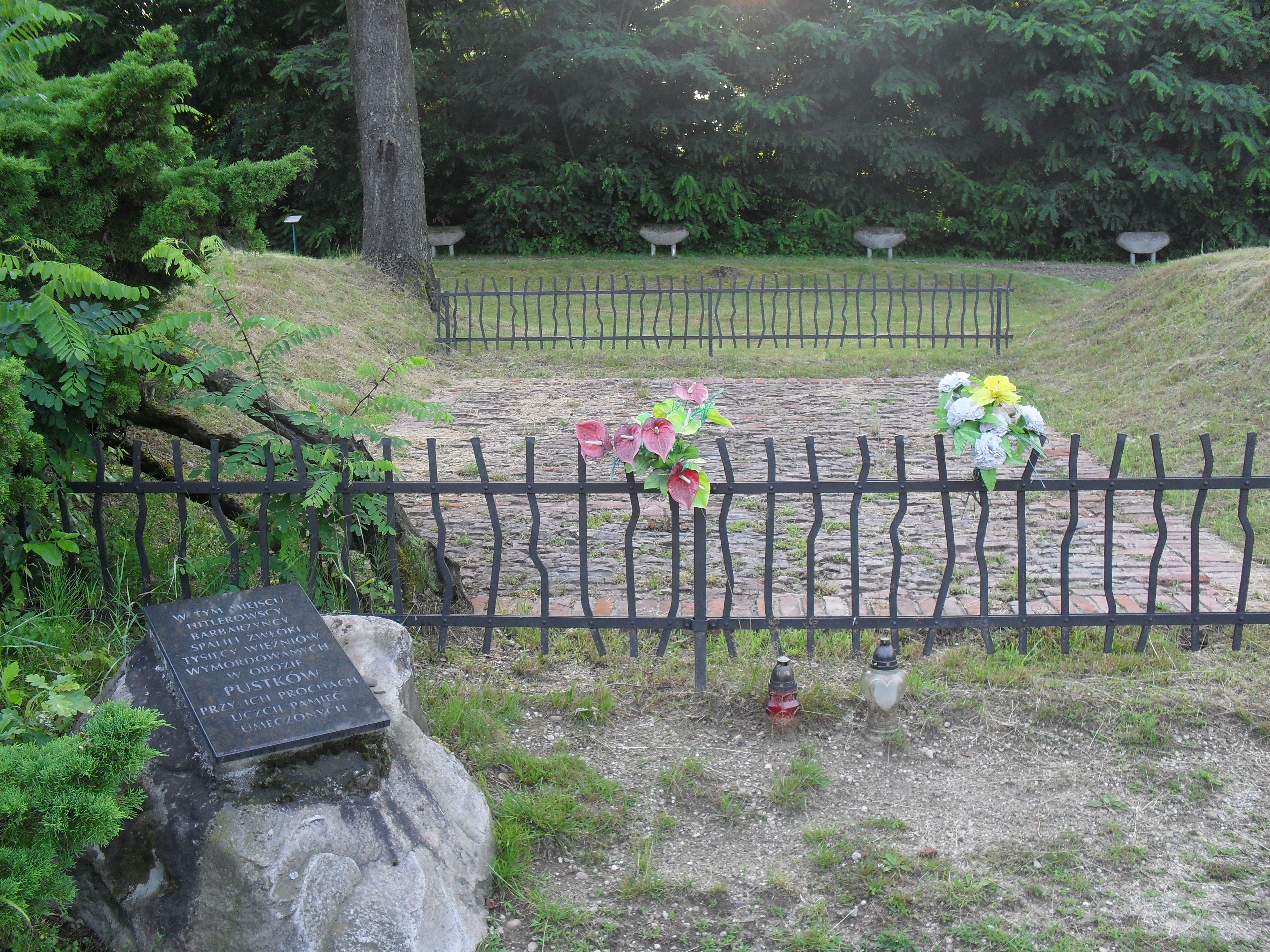 Krematorium na Górze Śmierci - wygląd obecny